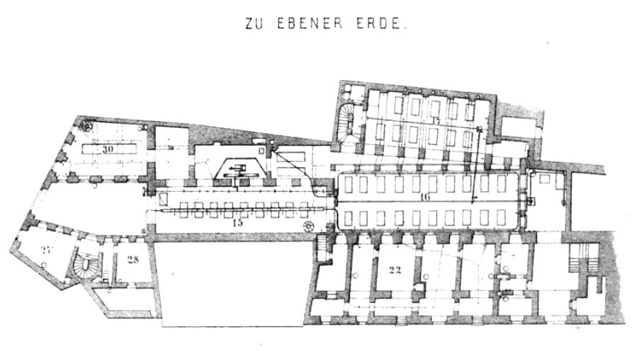 k. k. Hof- und Staatsdruckerei, Gebäude in Wien I., Singerstraße 26 / Seilerstätte 8; Erdgeschoß